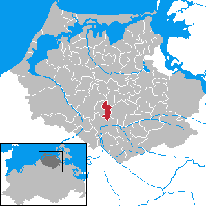 Drechow in Mecklenburg-Vorpommern - District Nordvorpommern